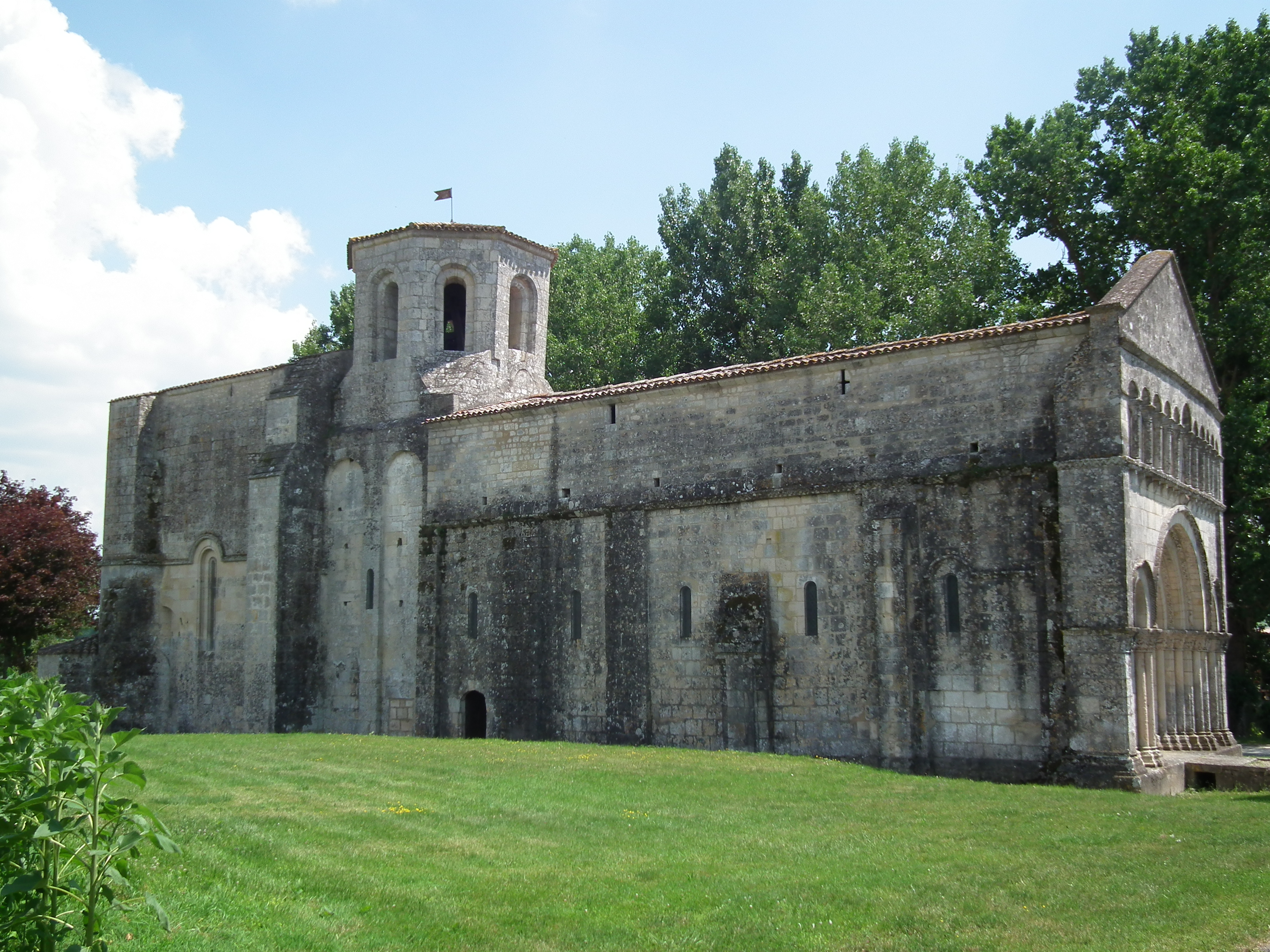 L'église romane de Biron